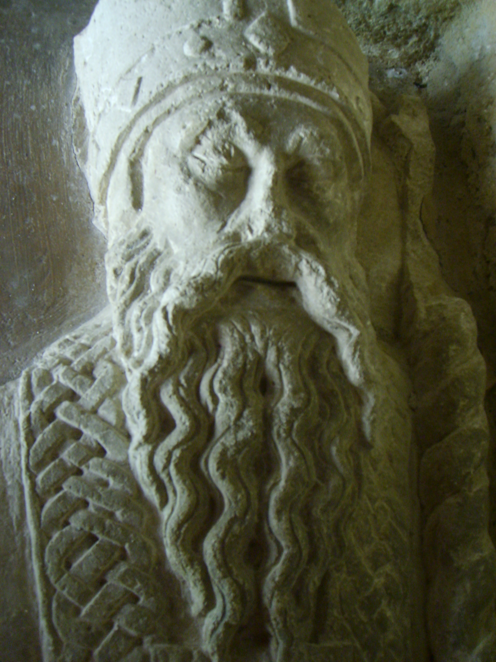 Cloître de Saint-Lizier (Ariège, France) : Gisant d'Hector d'Ossun, évêque de Couserans.